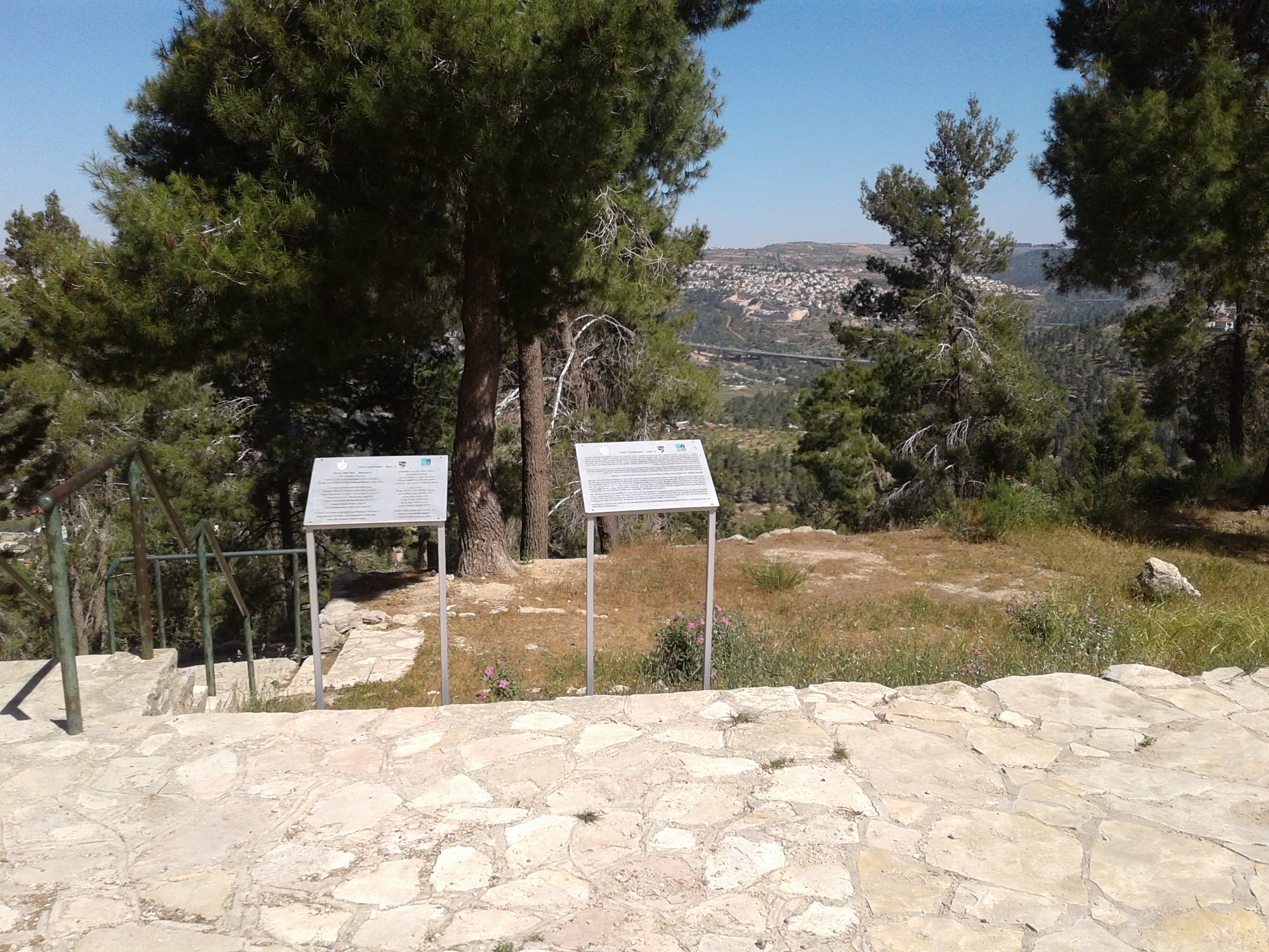 שלטי הנצחה לפלוגת יהונתן ביער ירושלים, באתר הקרב על חרבת חמאמה (גבעת כרם)